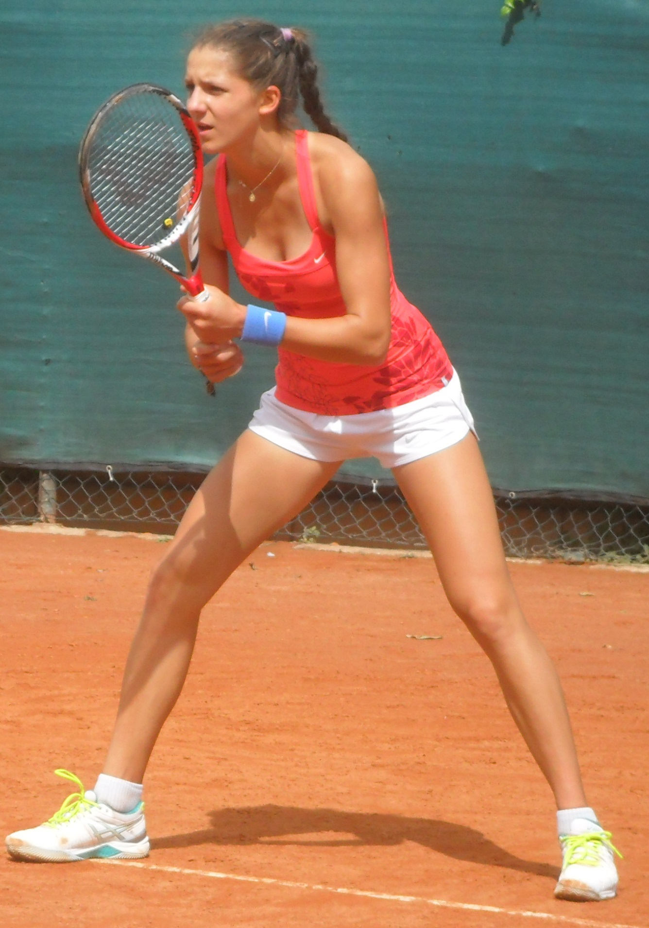 Rebeka Masarova nel 2015